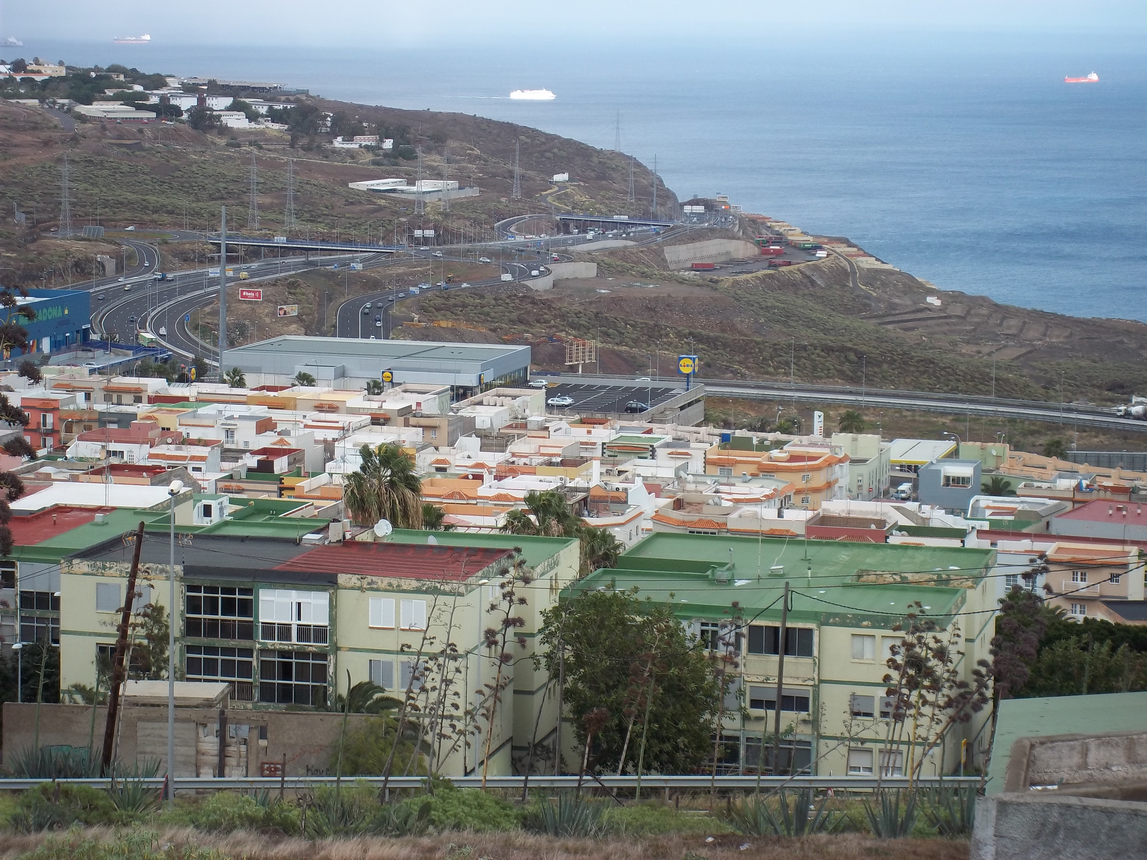 Vista de Santa María del Mar desde Los Alisios (Santa Cruz de Tenerife)